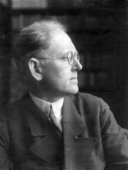 Portrait Paul Schultze-Naumburg